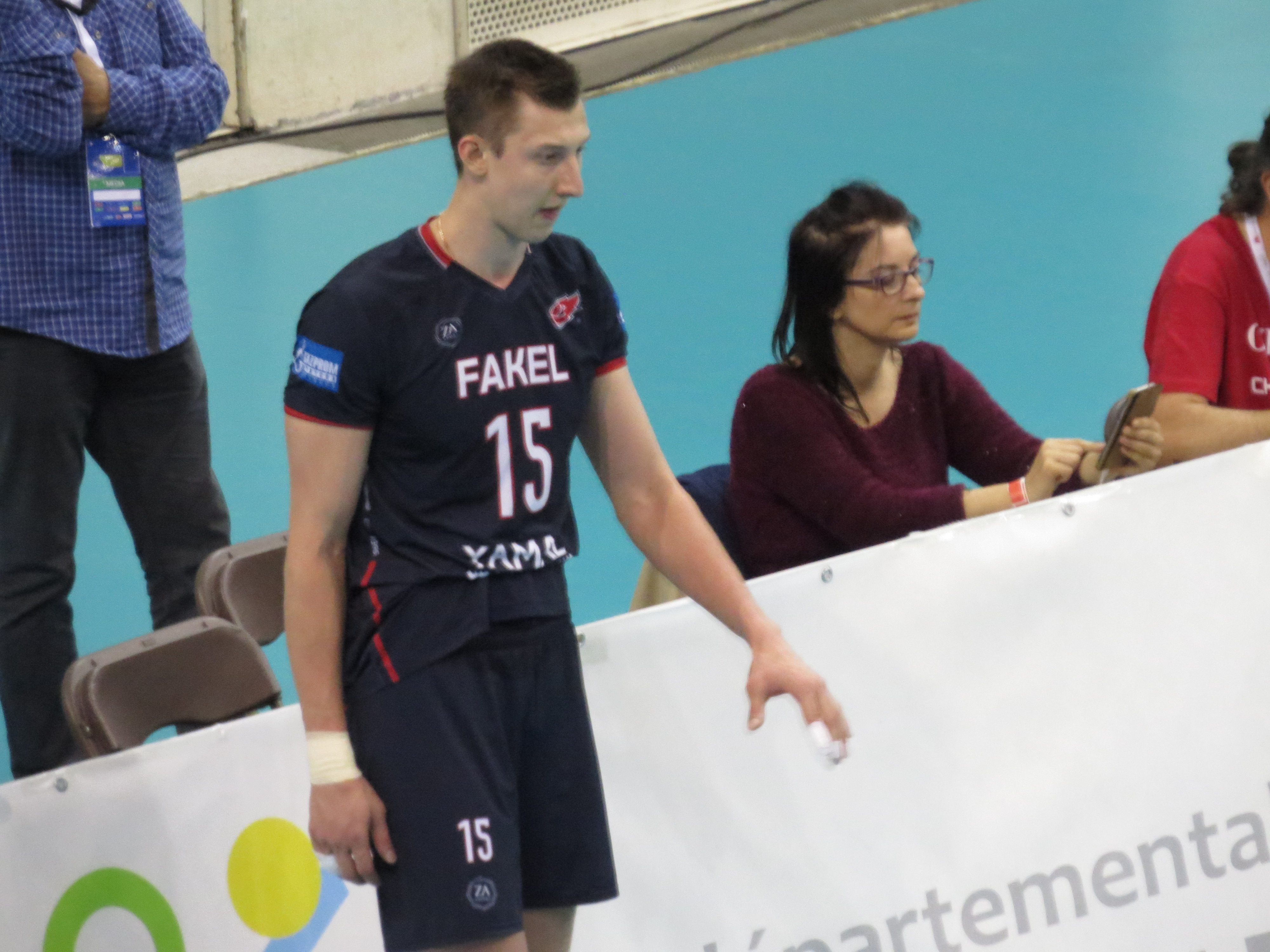 Photos réalisées lors de la finale aller de la Challenge Cup entre le Chaumont Volley-Ball 52 et le Fakel Novy Ourengoï à Paris (salle Charpy) 15 VOLKOV Dmitrii